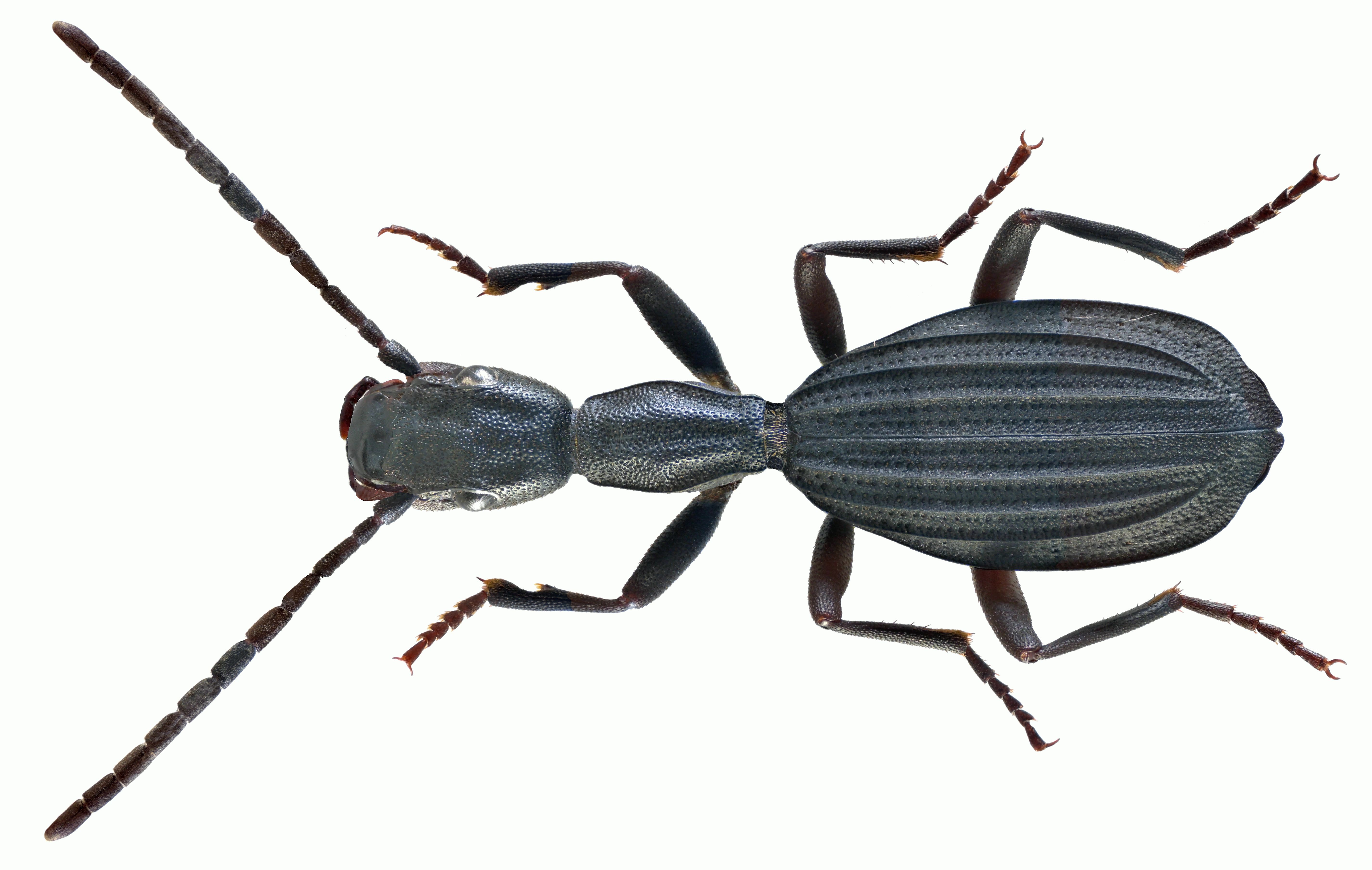 Netrodera formicaria (Erichson, 1843) Family: Carabidae Size: 14,5 mm Location: Namibia, Omaruru, 1200 m leg. U.Schmidt, 14.III.1994; det. J. Háva, 2011 Photo: U.Schmidt, 2013